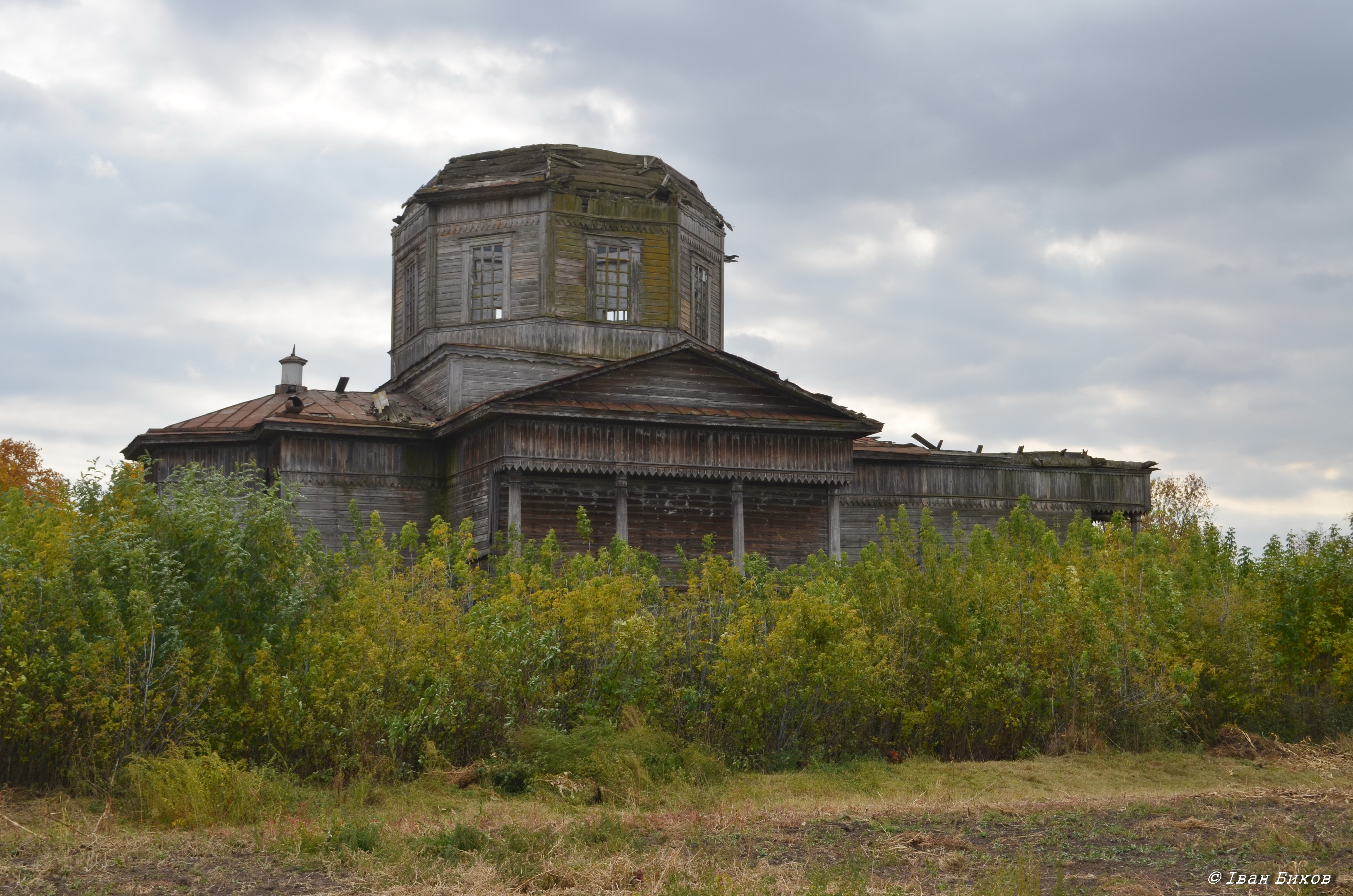 Слобідка. Закинута дерев'яна Покровська церква. 1834-36 рр.